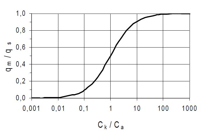 Einfluss des Koppelkondensators bei der konventionellen TE-Messung